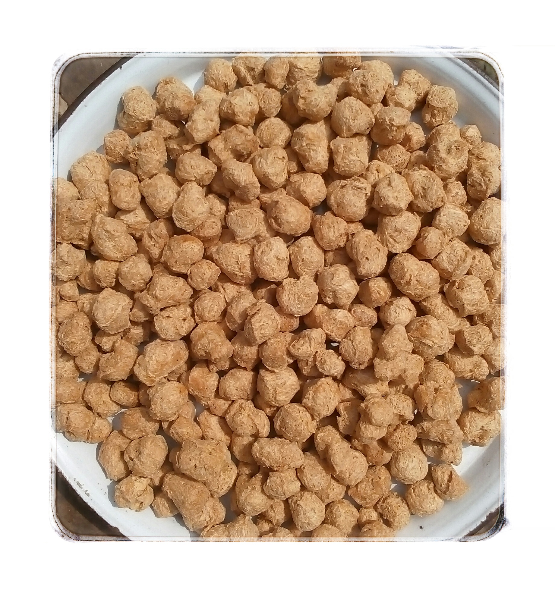 সয়াবিন খাদ্য